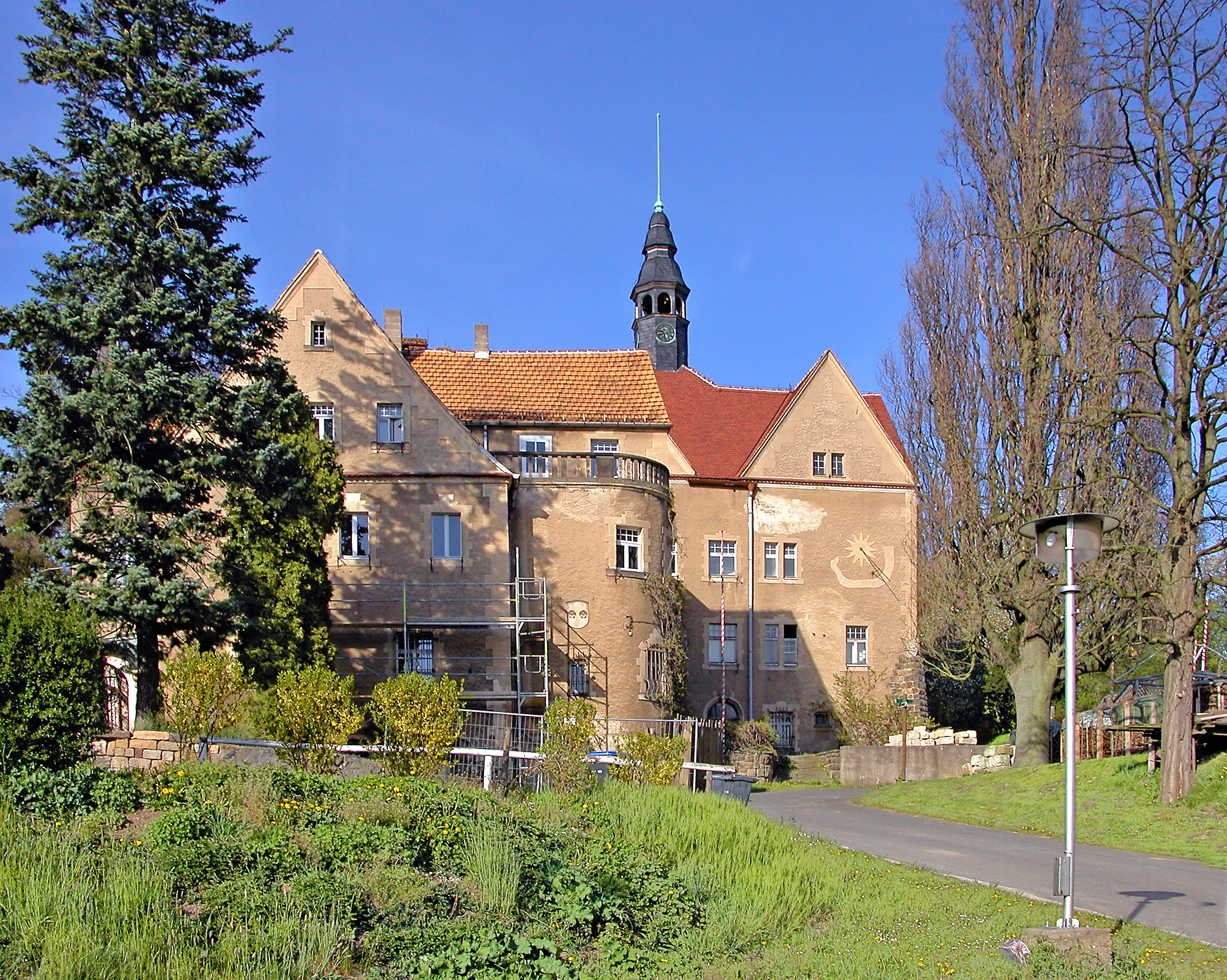 21.04.2007 01796 Thürmsdorf (Struppen), Am Schloßberg (GMP: 50.934651,14.045307): Schloß von Süden. Die Bausubstanz des vorderen Haupthauses reicht bis ins 17. Jh. zurück. 1899-1900 Umbau durch die Dresdner Architekten Schilling & Gräbner. 1908-1911 ließ der neue Besitzer, Freiherr Erich von Biedermannden, den hinteren Gebäudeteil vom Architekten Fürchtegott Kemnitzer aus Pirna hinzufügen und den Park anlegen. Nach 1945 / in der DDR war das Schloß zunächst Gewerkschaftsschule und dann FDGB-Erholungsheim. Seit 1992 ist es unbewohnt. 1997 privatisiert. Geplant ist der Umbau zum Schloßhotel. Im Mai 2008 ist es noch leerstehend. [DSCN22097.TIF]20070421440DR.JPG(c)Blobelt